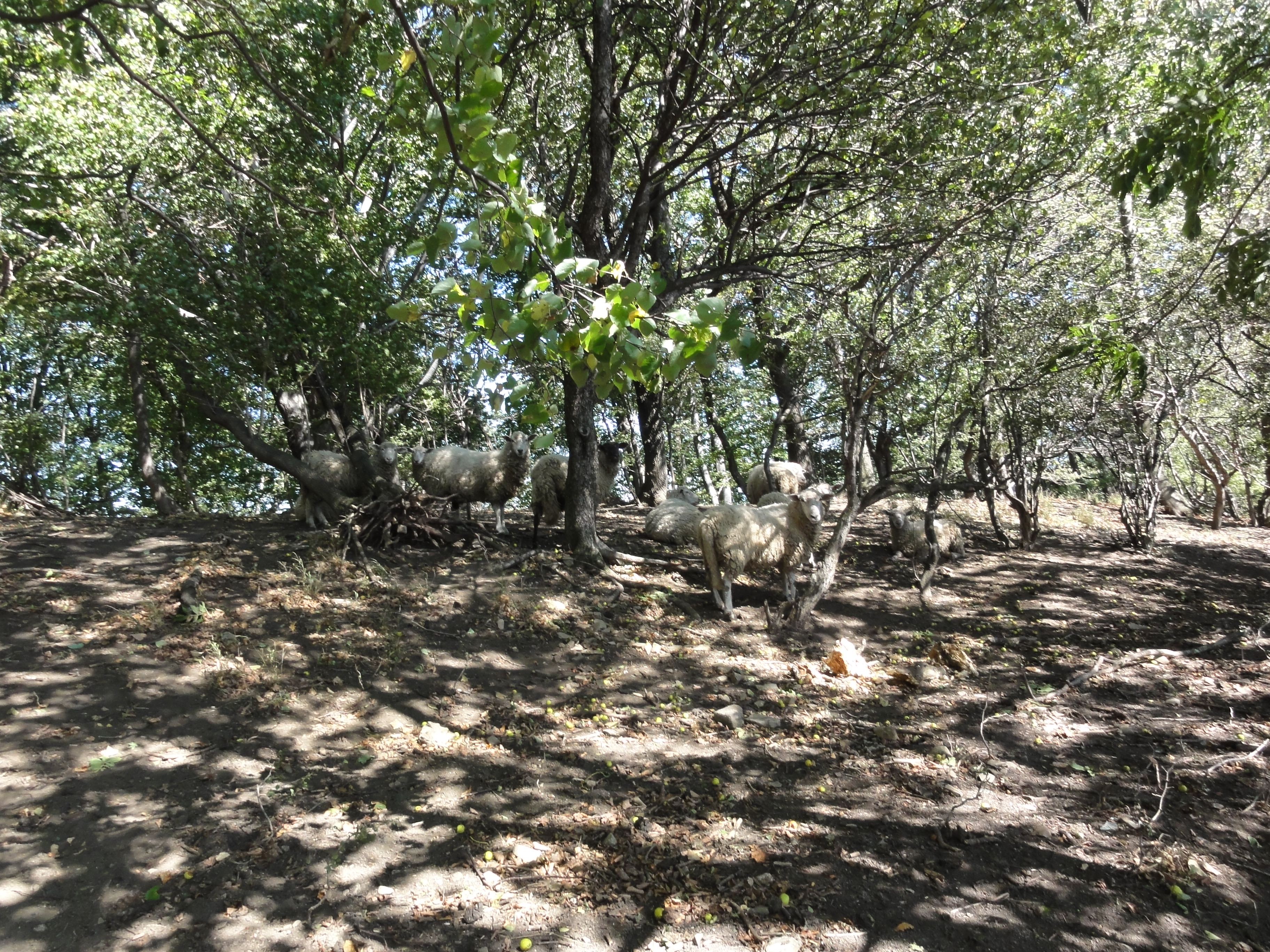 Owce na Tule